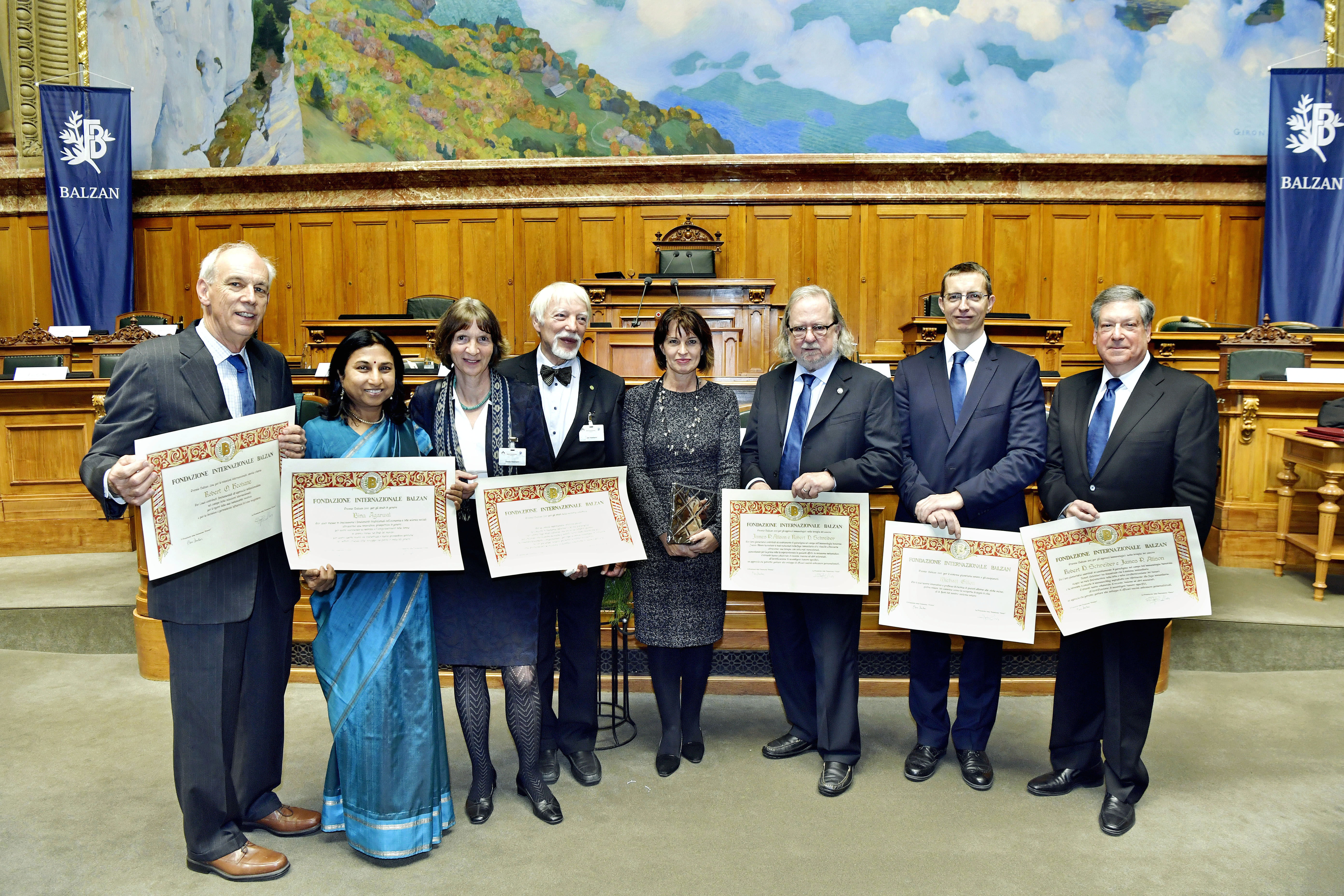 Verleihung der Balzan Preise 2017 in Bern.